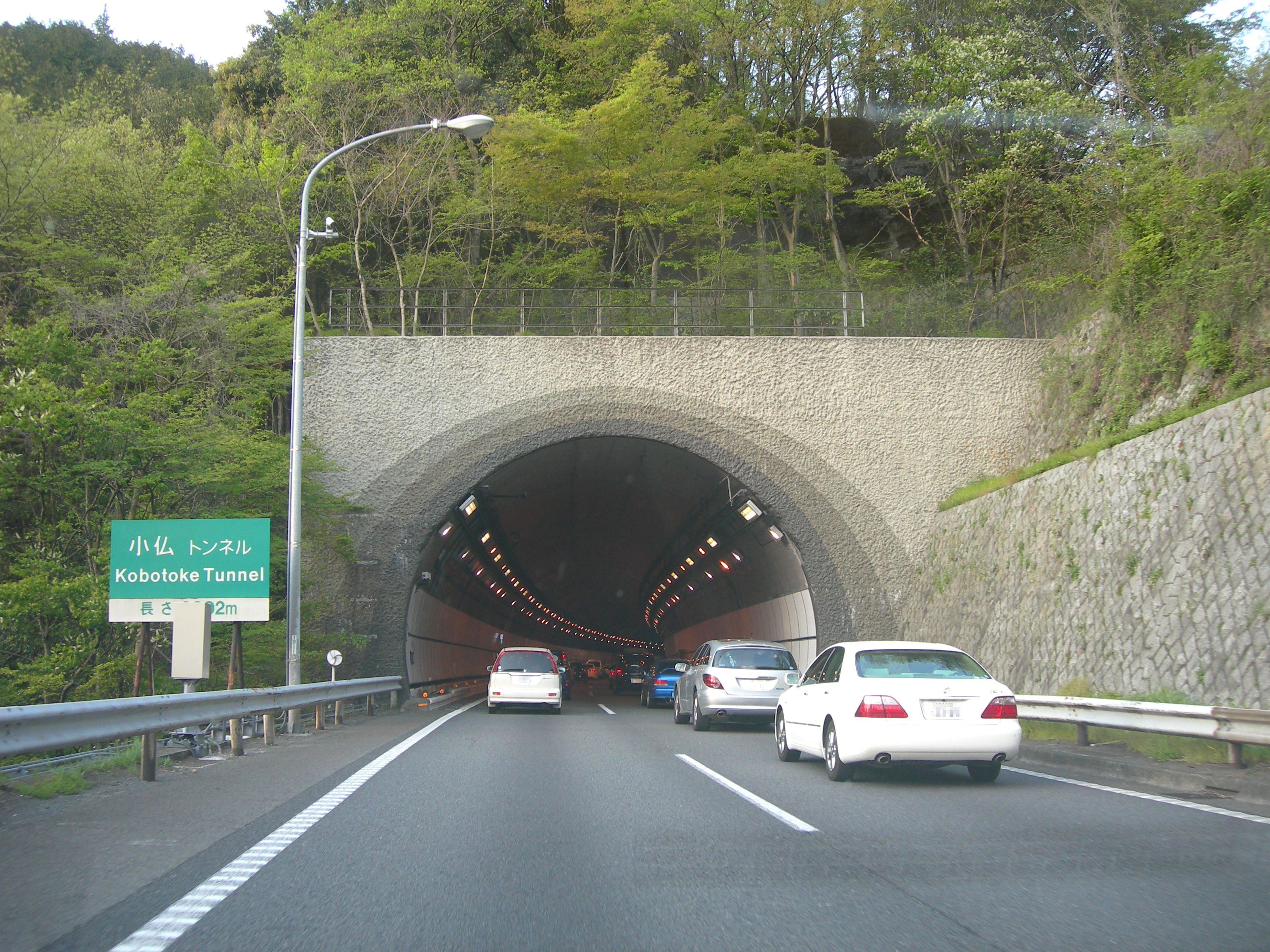 中央自動車道小仏トンネル上り線